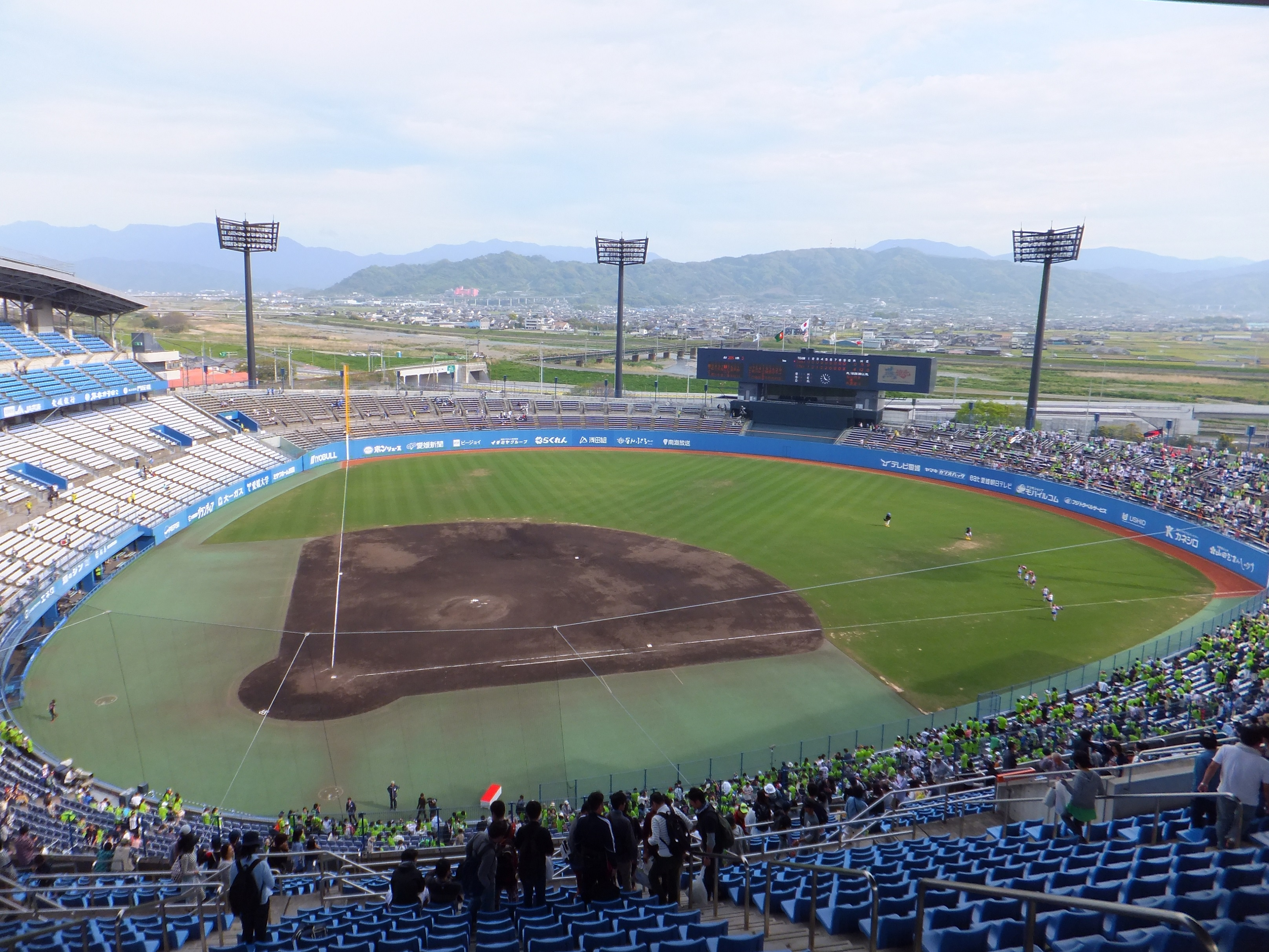 愛媛県松山市 松山中央公園野球場 2016年4月16日